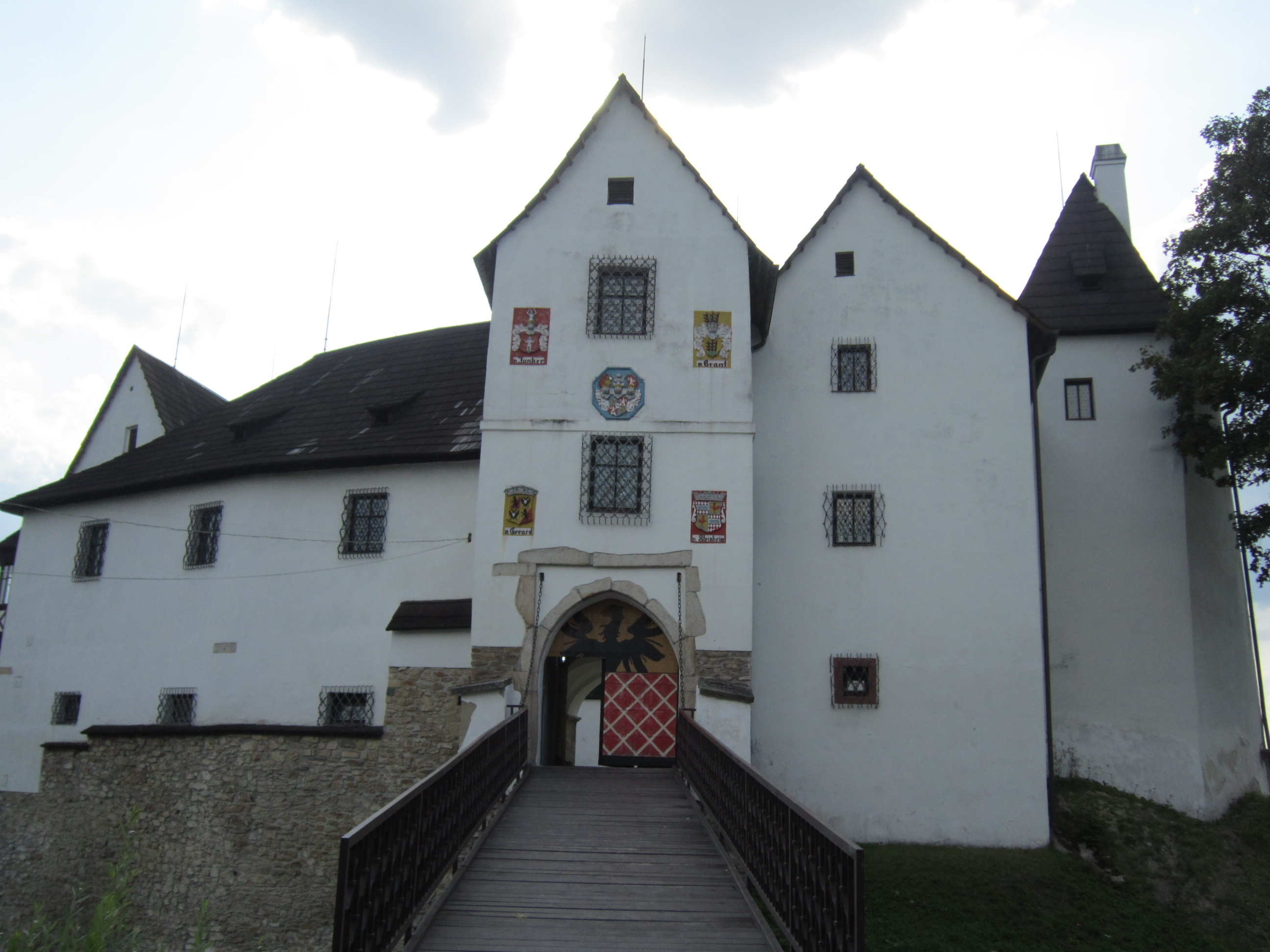 Seeberg Castle in Ostroh (Bohemia)